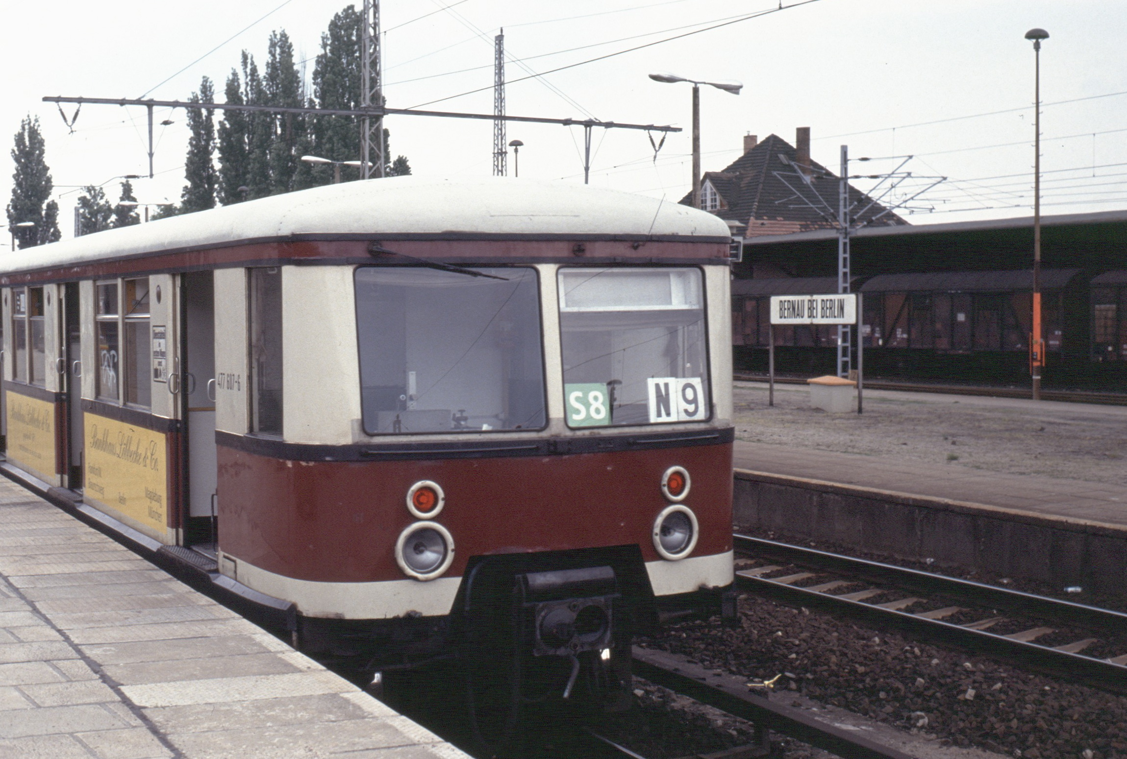 S-Bahn Baureihe 277 der DR im Bahnhof Bernau